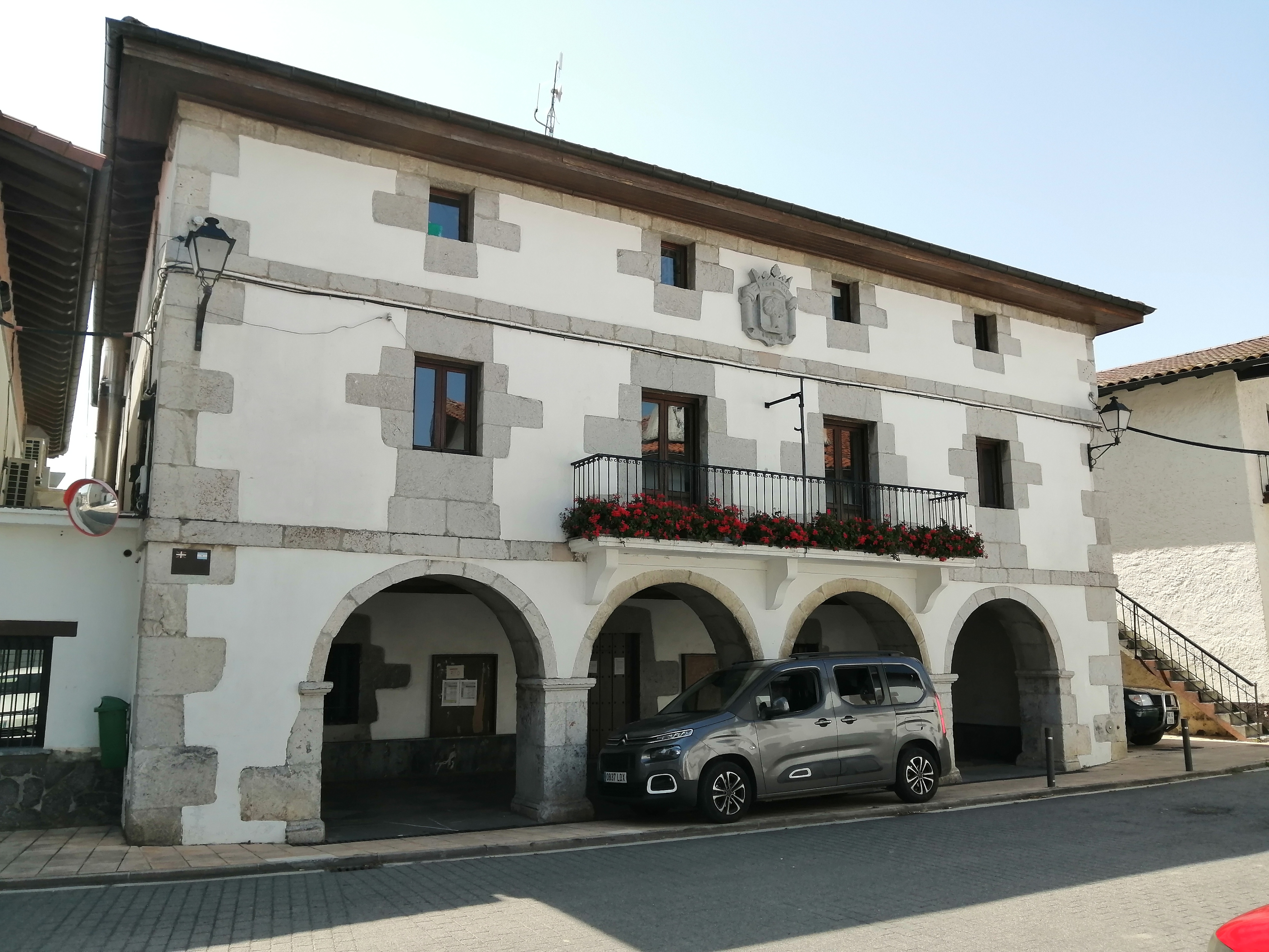 Abaltzisketako udaletxea